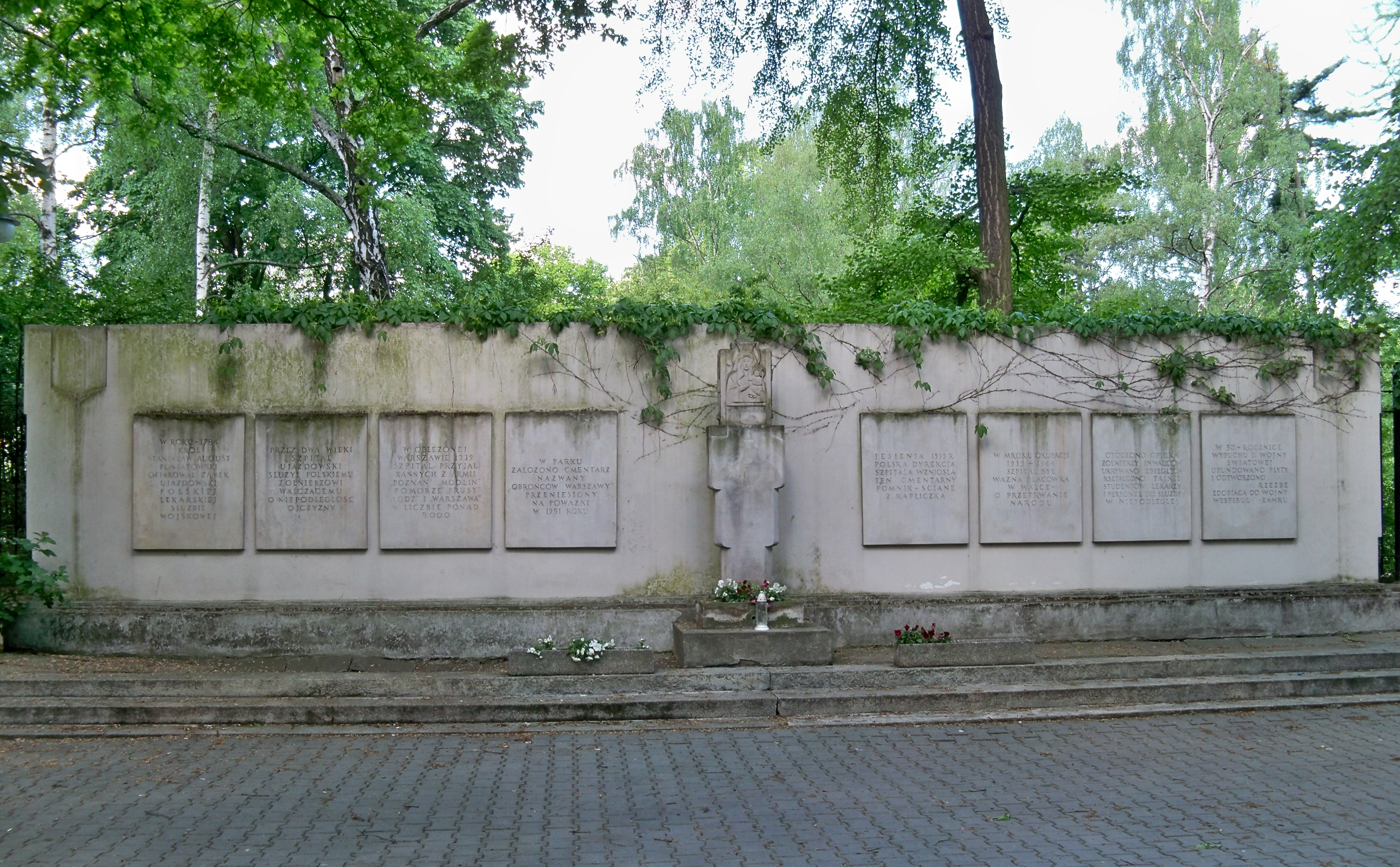 Mur przy ogrodzeniu Parku Ujazdowskiego w Warszawie, na miejscu polowego cmentarza obrońców Warszawy przy Szpitalu Ujazdowskim funkcjonującym w latach 1939–1950 (przeniesiony na Powązki)